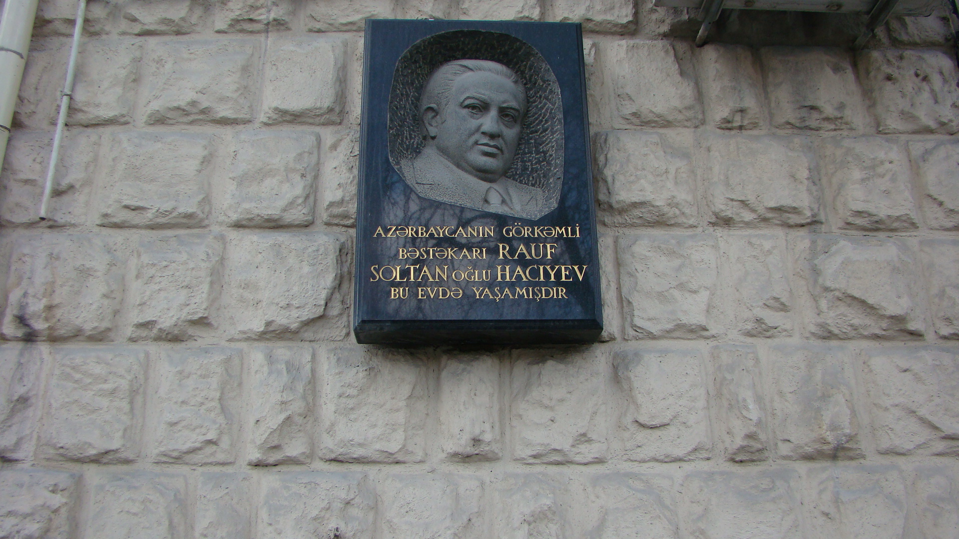 Rauf Hacıyevin Səməd Vurğun küçəsindəki baralyefi